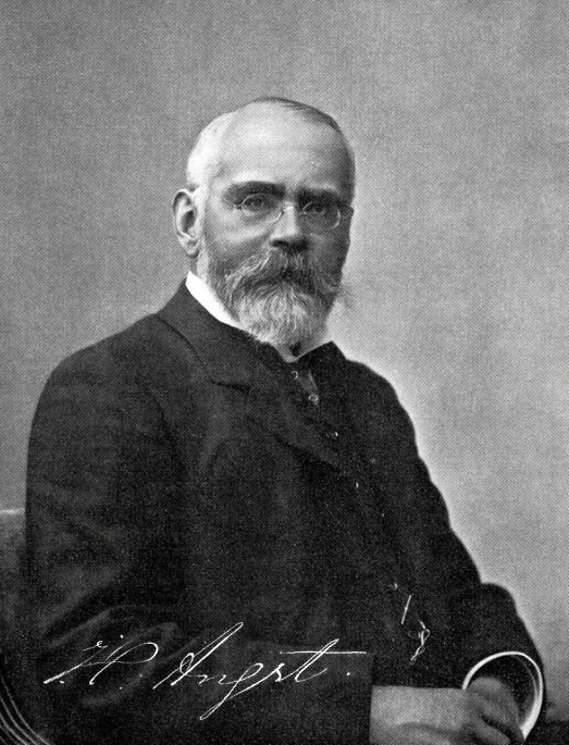 Heinrich Angst (1847–1922) Kaufmann, Antiquitäten Sammler, erster Direktor des Schweizerischen Landesmuseum in Zürich. Fotografie von Ph. & E. Linke, Zürich.